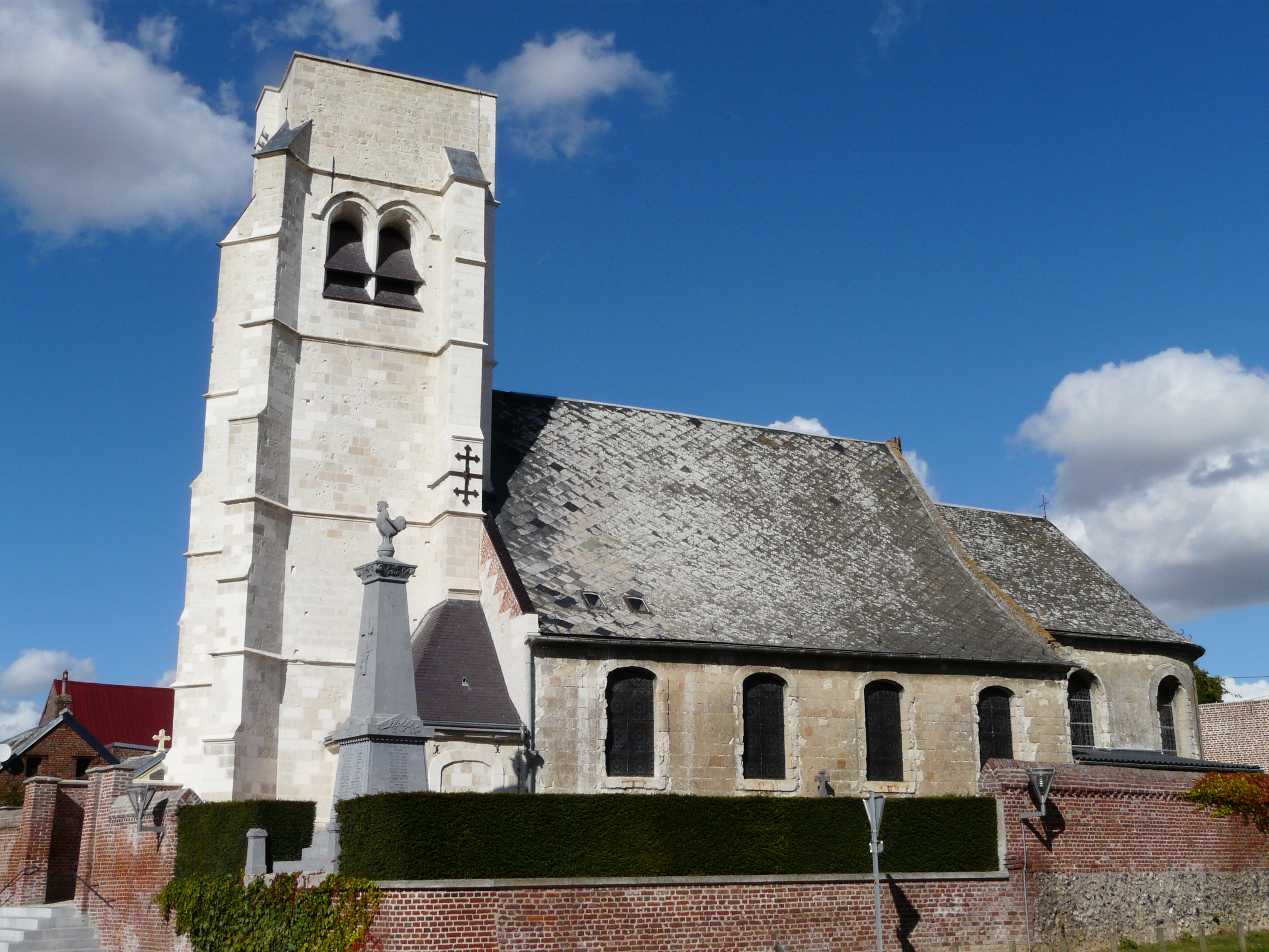 Le clocher de l'église après sa restauration, septembre 2012